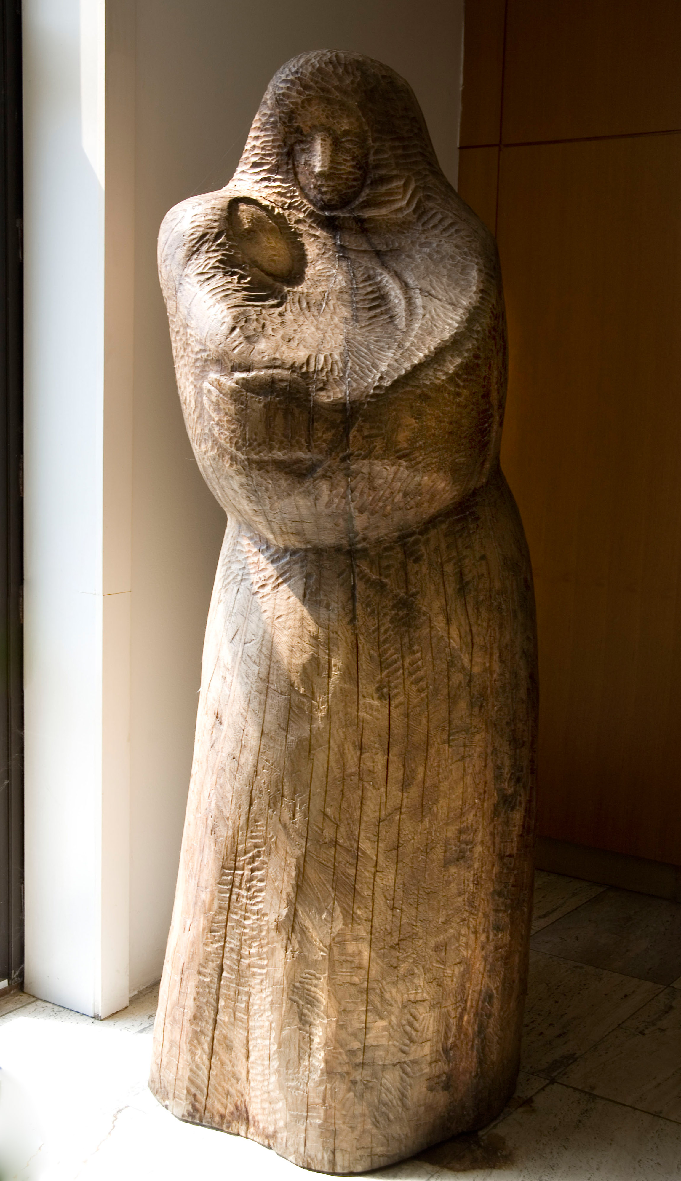 Drevená skulptúra